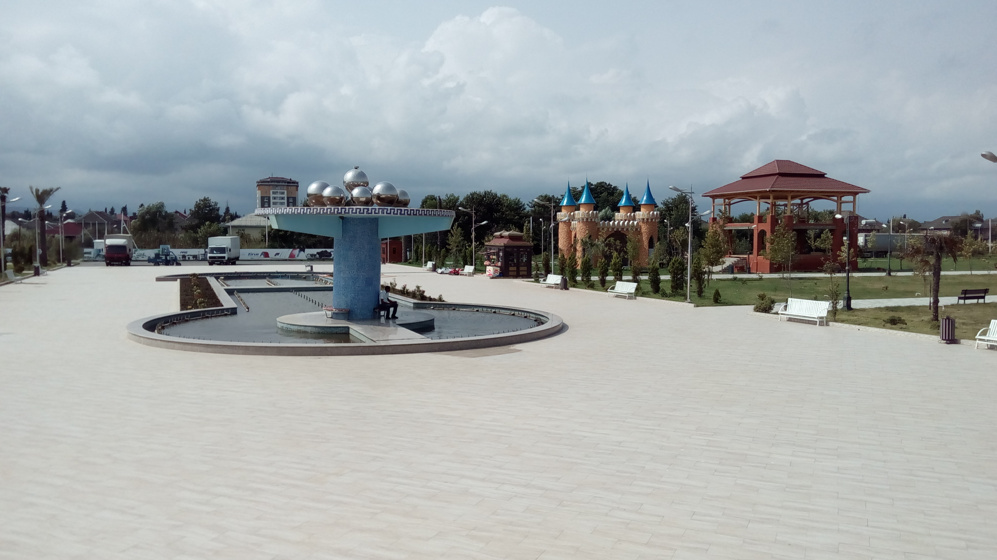 Astara bulvarı